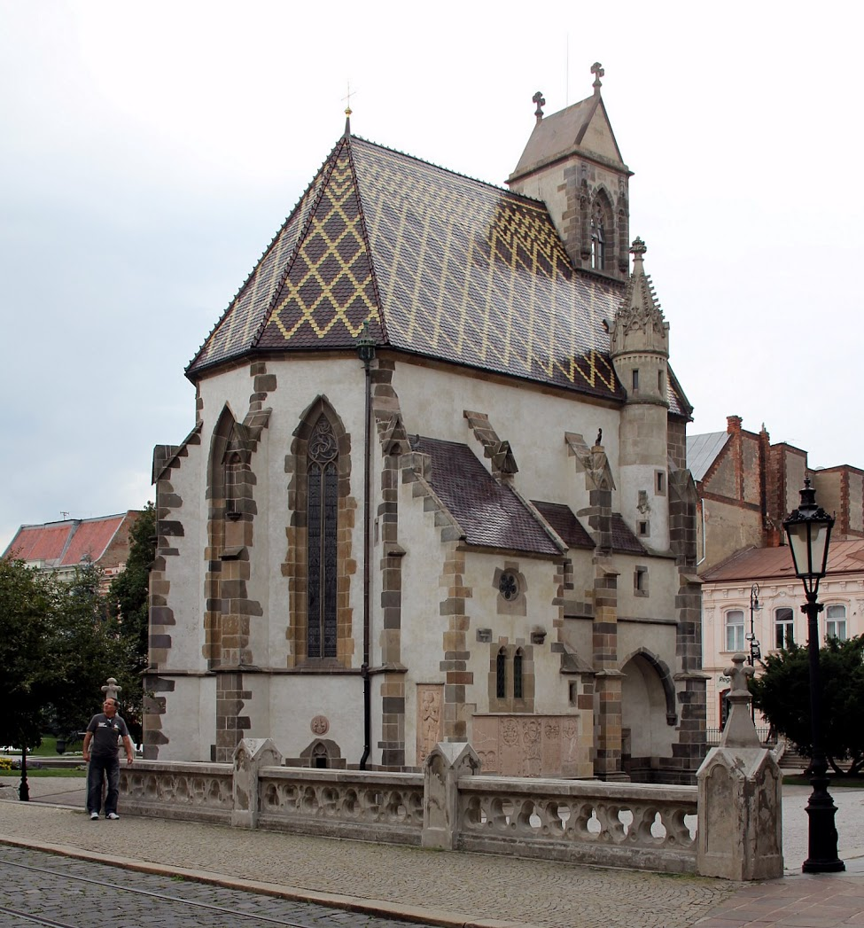 Kassa, Szt Mihály kápolna.